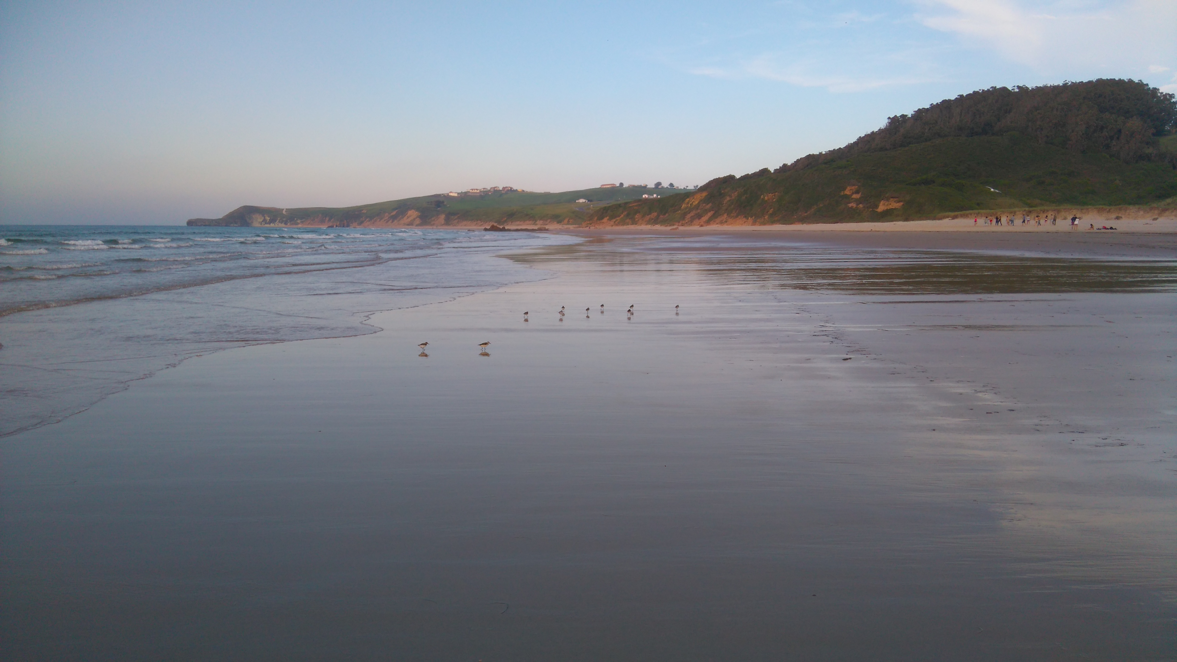 Rías occidentales y Duna de Oyambre This is a photography of a Site of Community Importance in Spain with the ID: ES1300003. Natura2000 entry, EEA entry